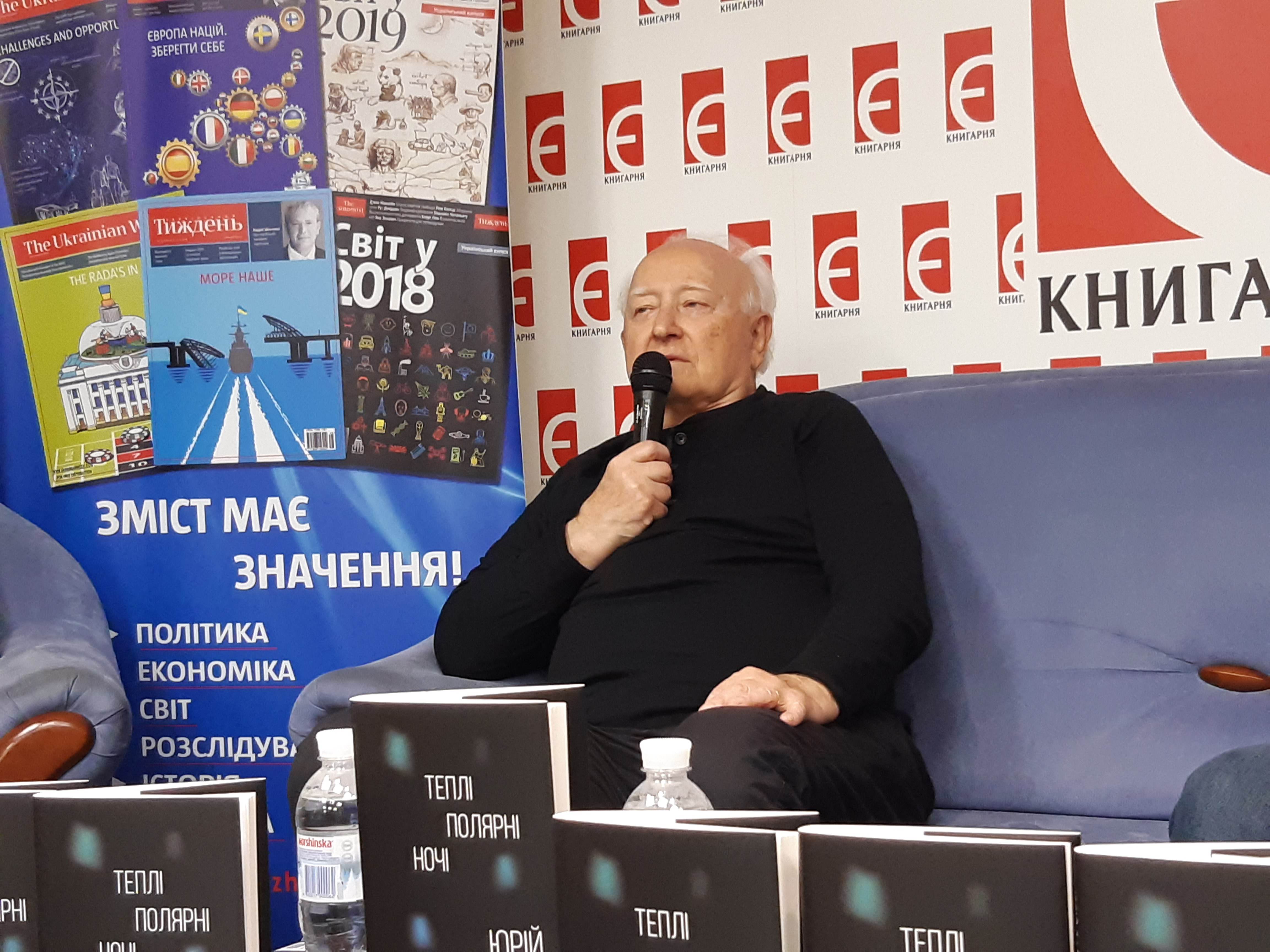 Юрій Тарнавський в Києві